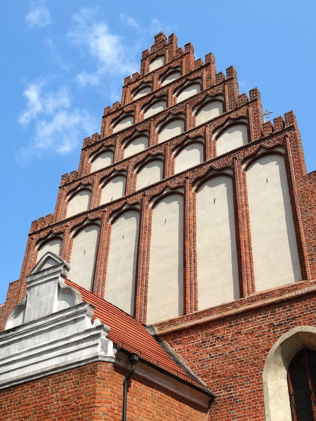 Katedra p.w. św. Marcina i Mikołaja w Bydgoszczy